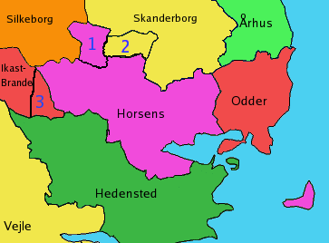 Kort over den nye Horsens Kommune